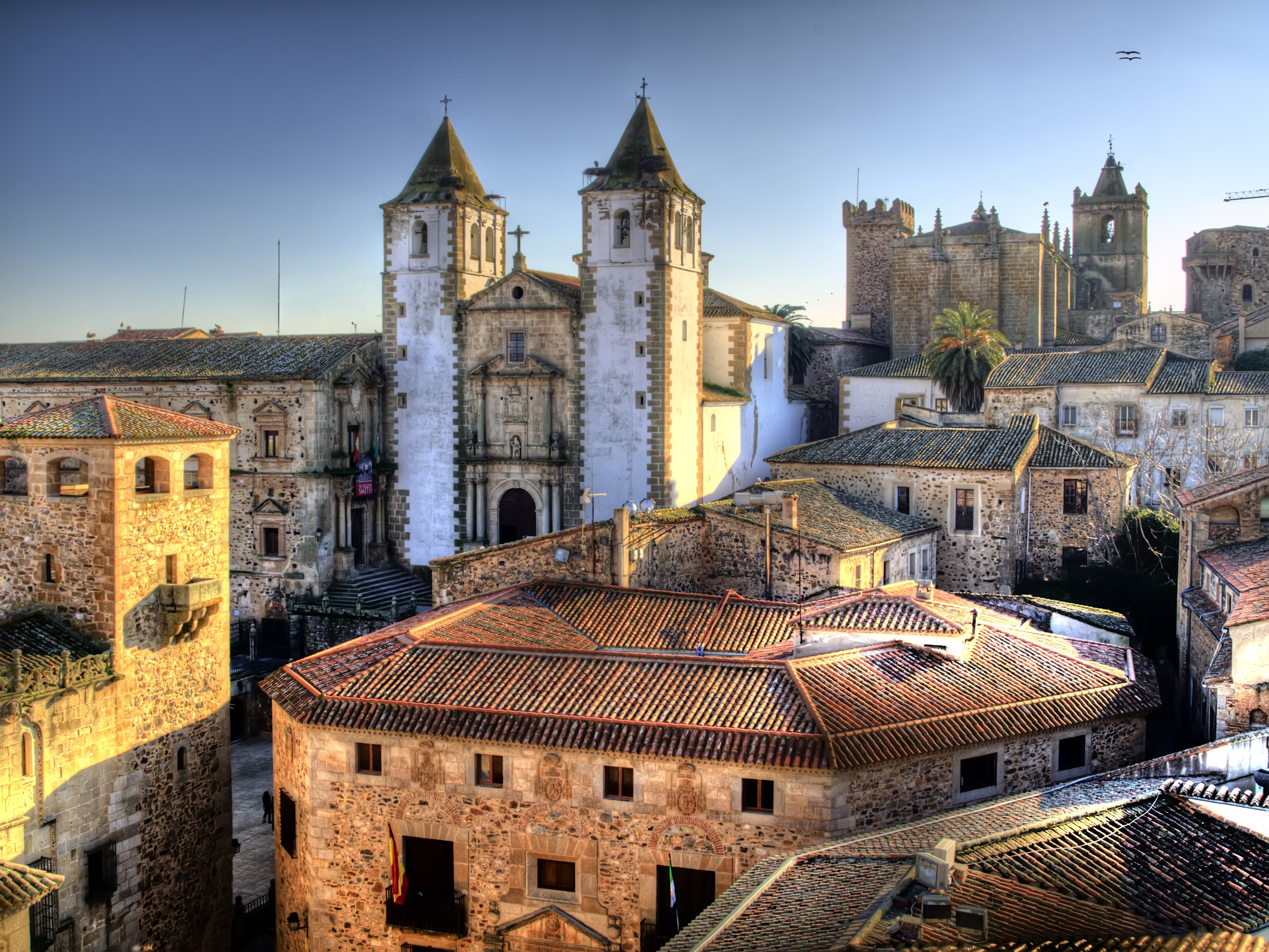 Caceres_13_1